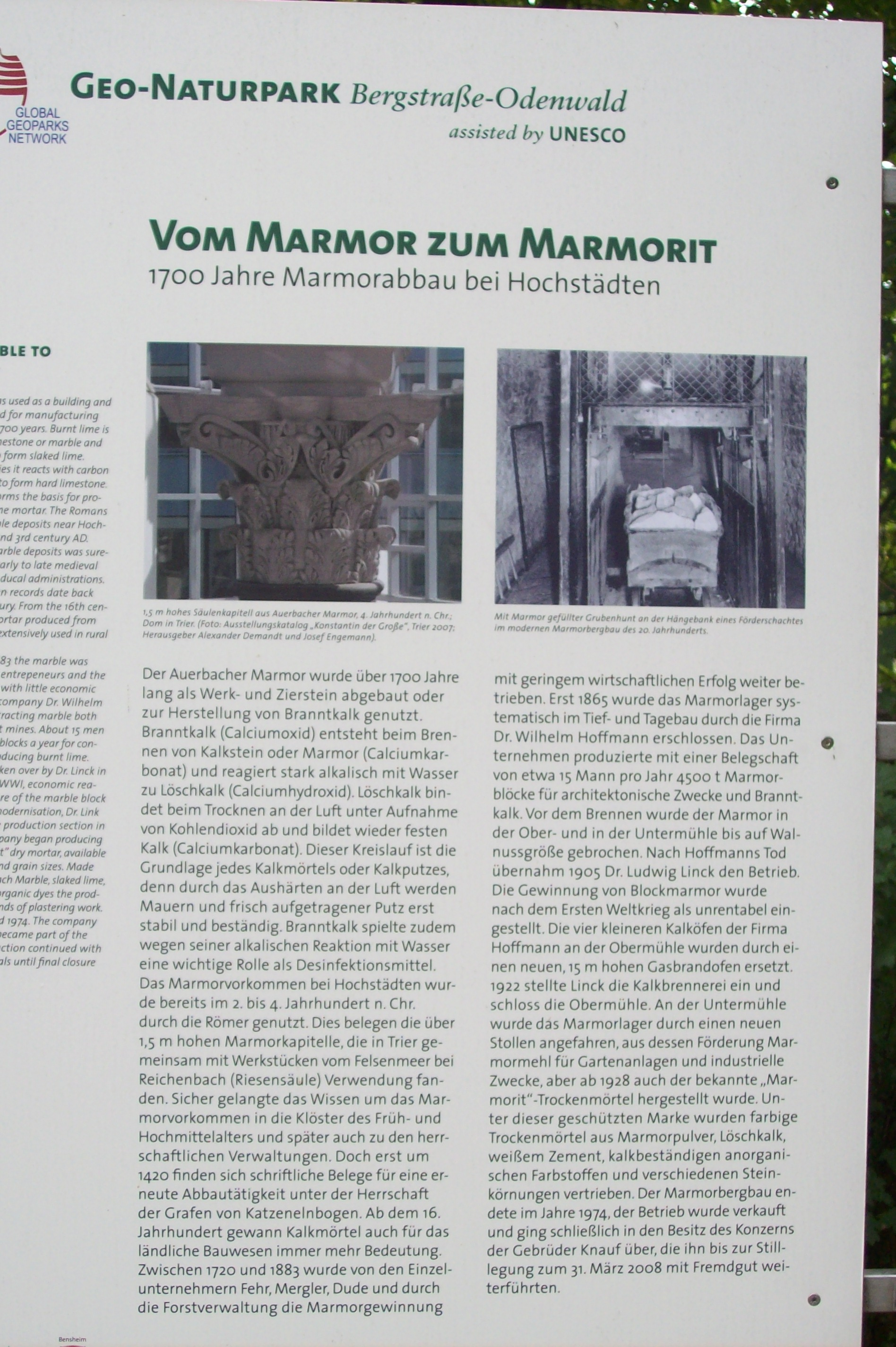 Hinweistafel auf den Auerbacher Marmor bei Bensheim-Hochstädten, Hessen, Deutschland